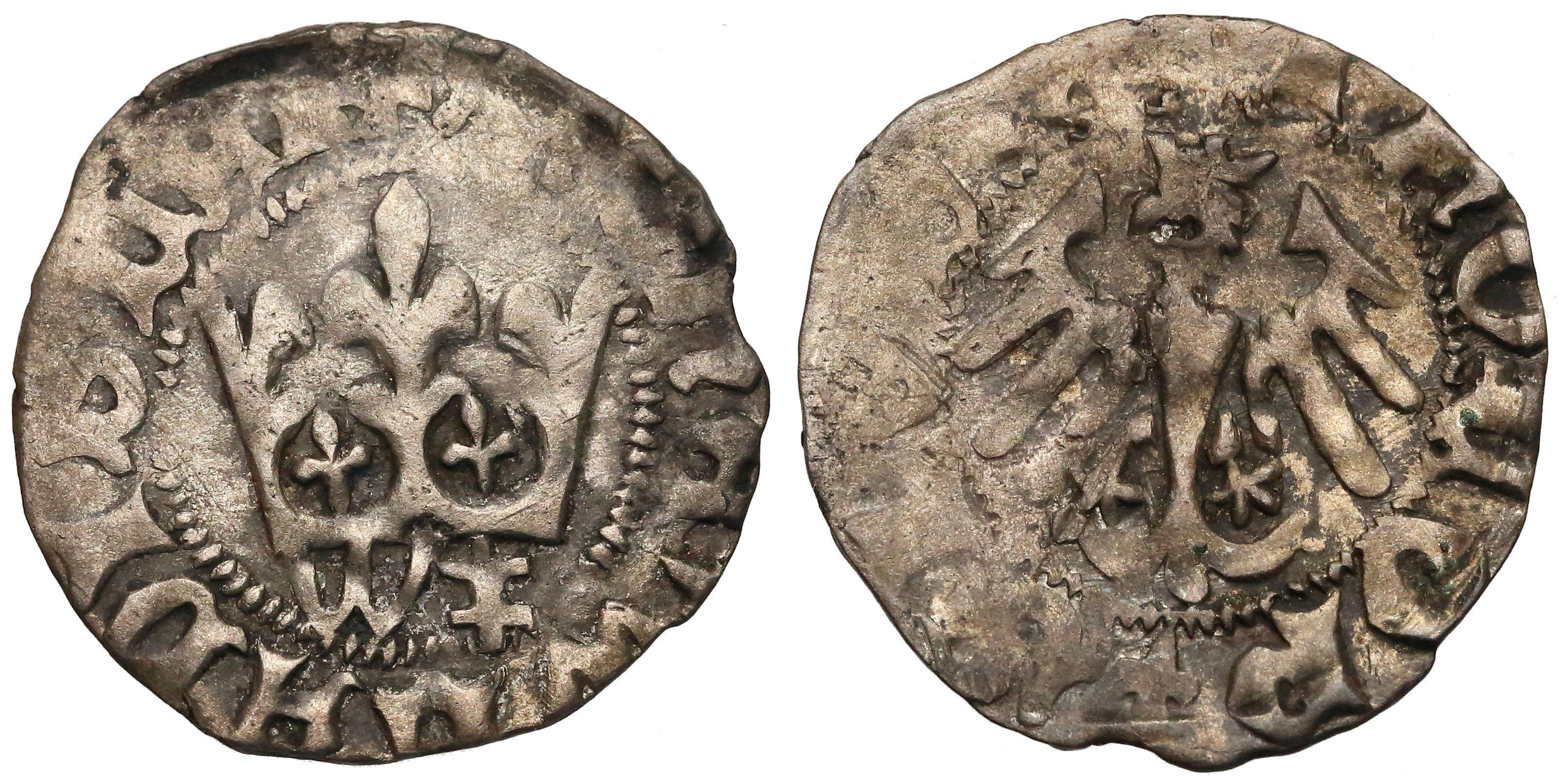 Półgrosz koronny Władysław Jagiełło Wschowa